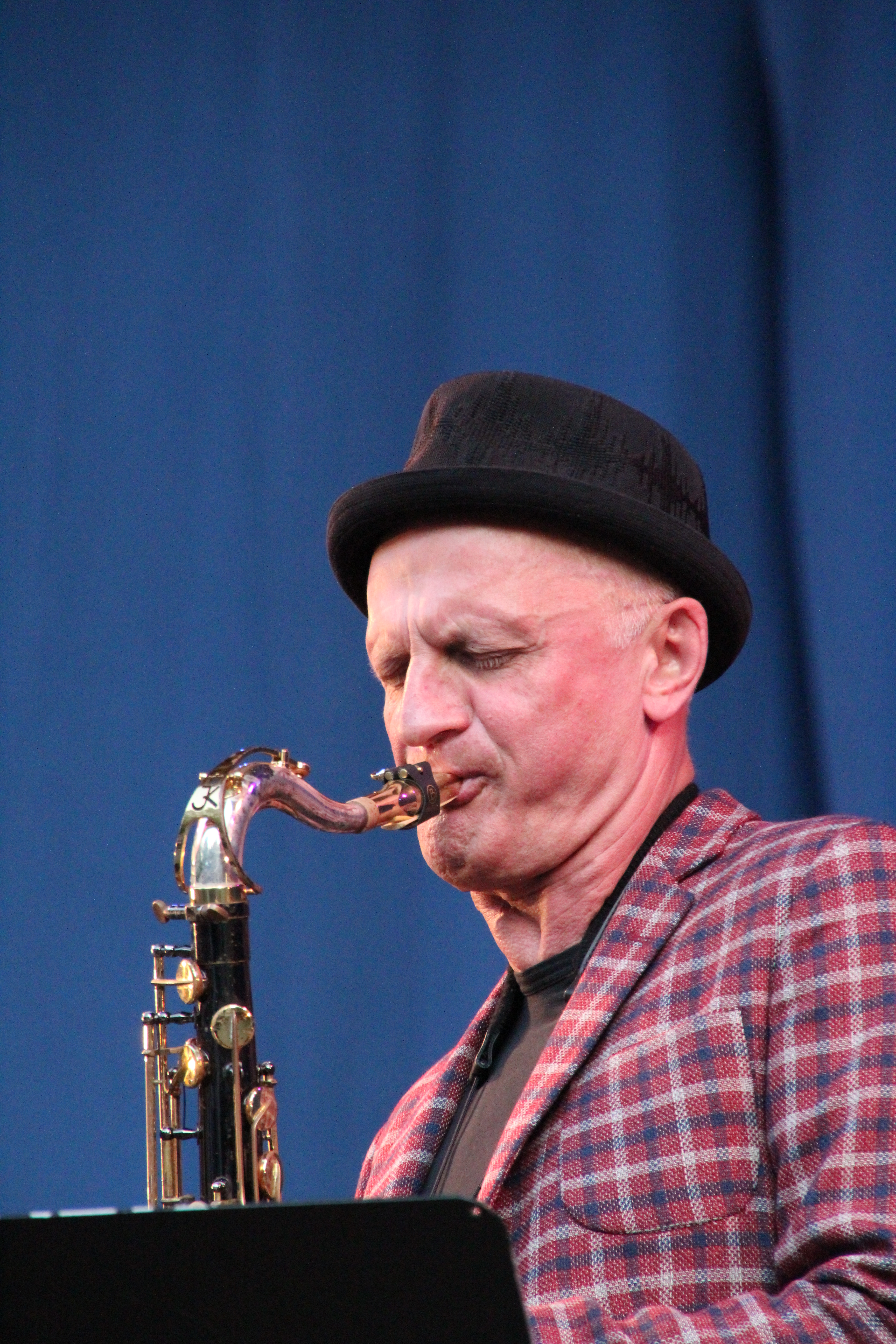 Bildinhalt: Andrzej Olejniczak bei einem Auftritt mit dem European Blue Note Quartet im Frankfurter Palmengarten Aufnahmeort: Frankfurt am Main, Deutschland Die dargestellte Person wurde bei einem öffentlichen Auftritt fotografiert.